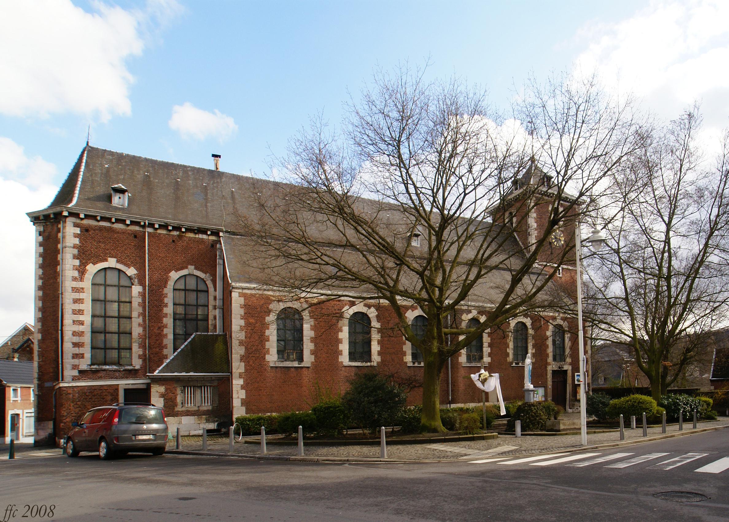 Chênée (Belgium) Saint-Peter's ChurchEsglésia Sant PereÉglise Saint-Pierre Sint-Pieterskerk